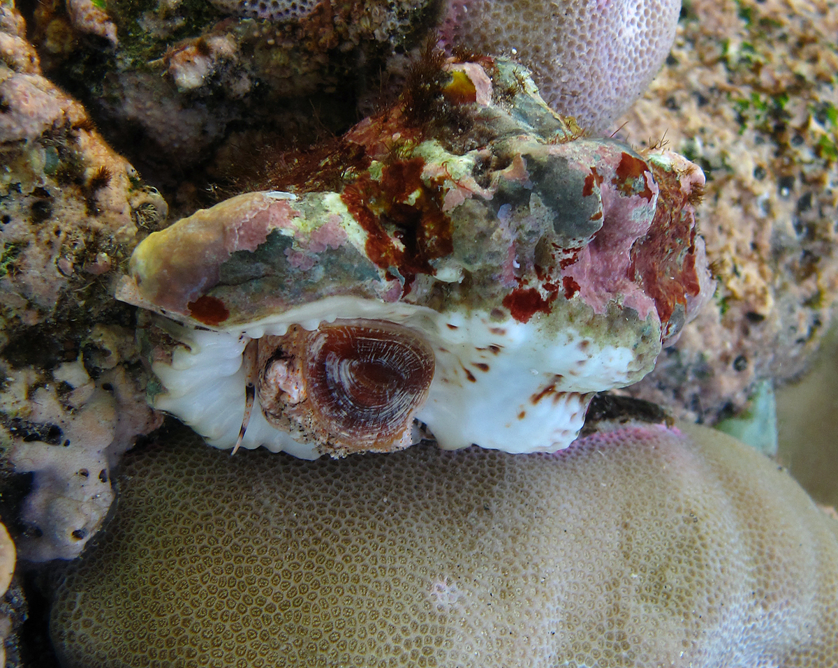 Le gastéropode Bursa bufonia à la Réunion.